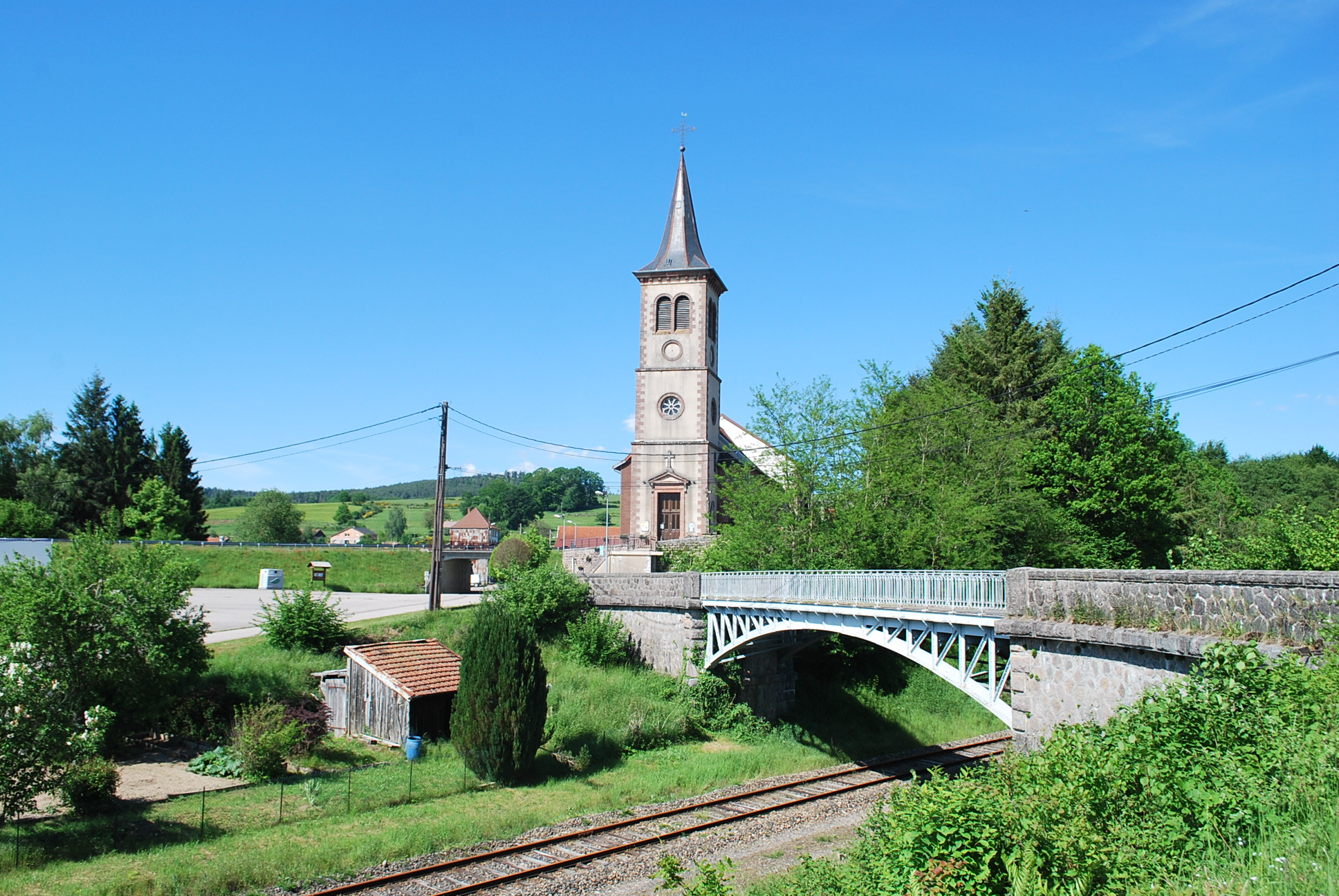 Église Sainte-Menne de Deycimont